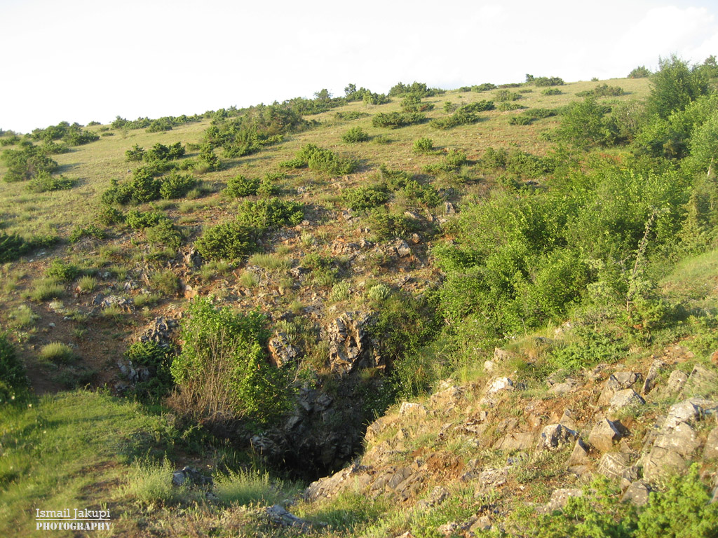 Shpella e Brrutit